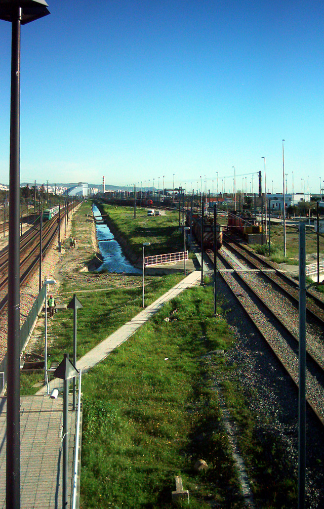 Vala da Bobadela